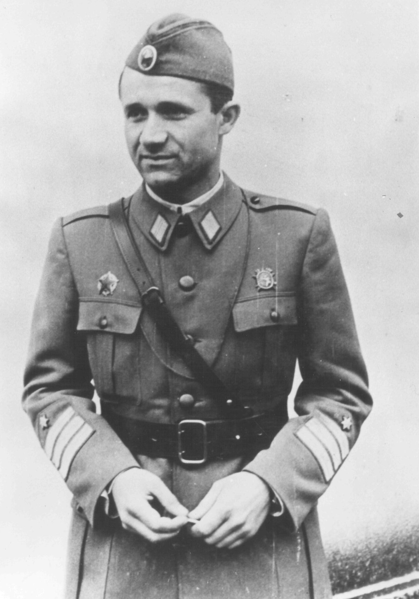 Srpskohrvatski / српскохрватски: Petar Drapšin 1944.